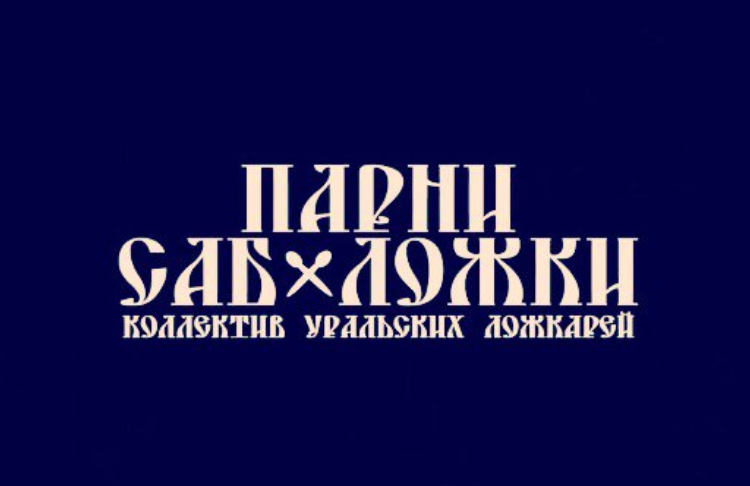 Логотип коллектива "Парни Саб Ложки"